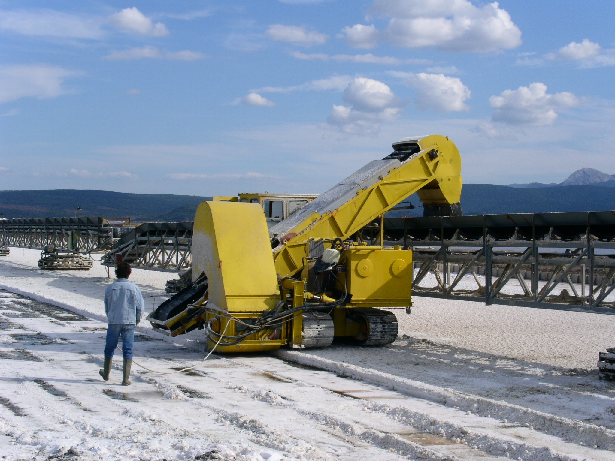 The extraction of the salt